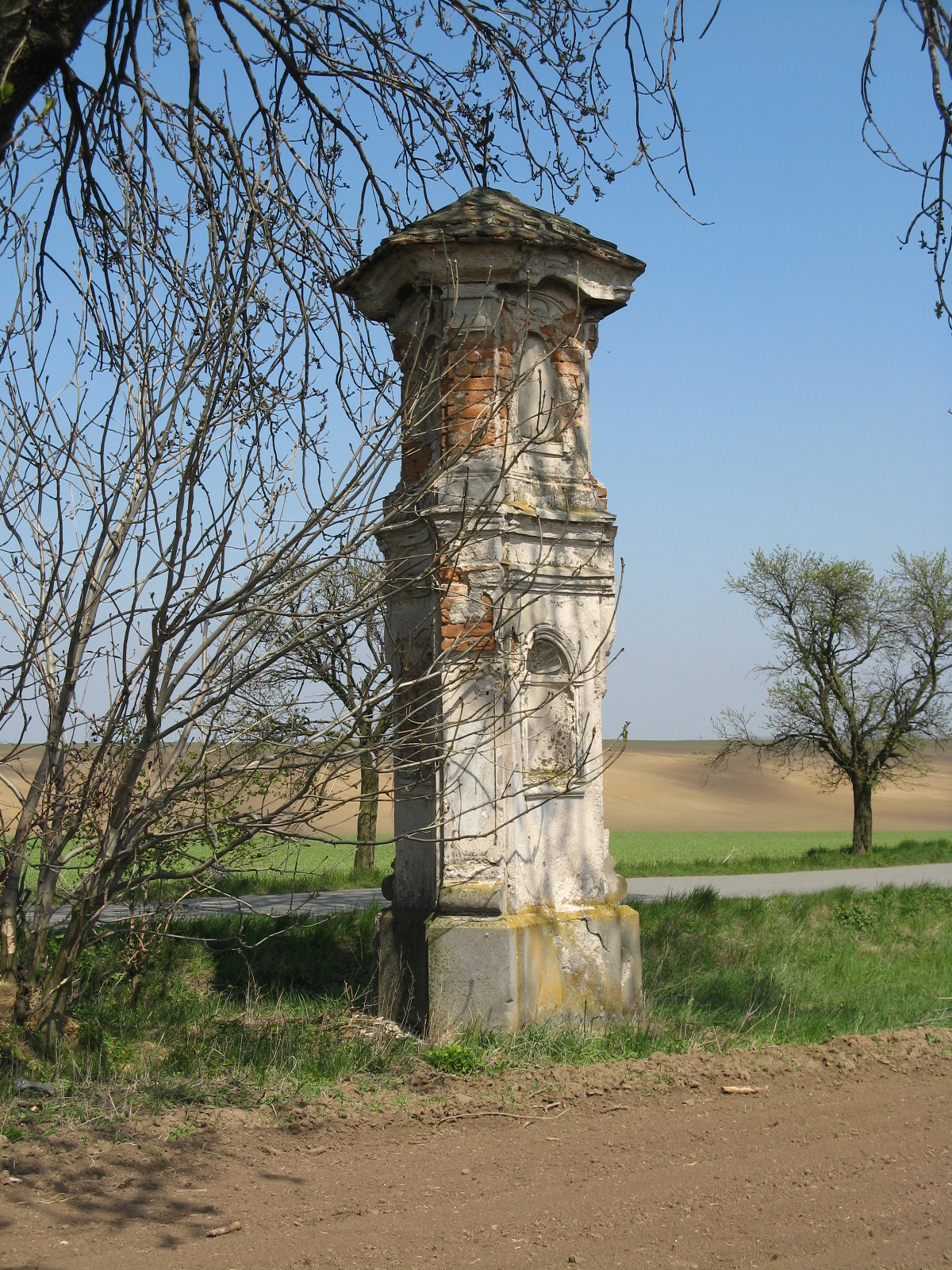 Boží muka (Želeč), při silnici do Doloplaz, Želeč